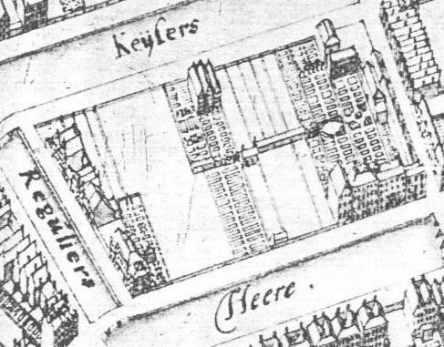 Detail kaart 1680 door Jacobus Bosch van de kavels tussen de Reguliersgracht en de Vijzelstraat, waarvan een groot aantal nog niet waren verkocht.